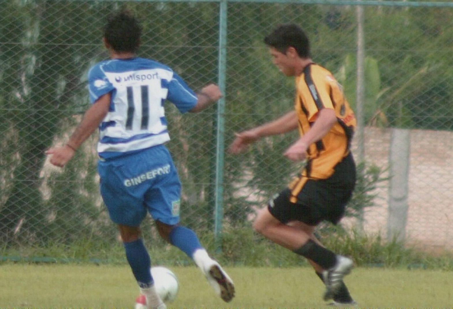 Paulo Centurión jugando para el Club Guaraní, conduce el balón frente a Edison Giménez del Club Sportivo 2 de Mayo